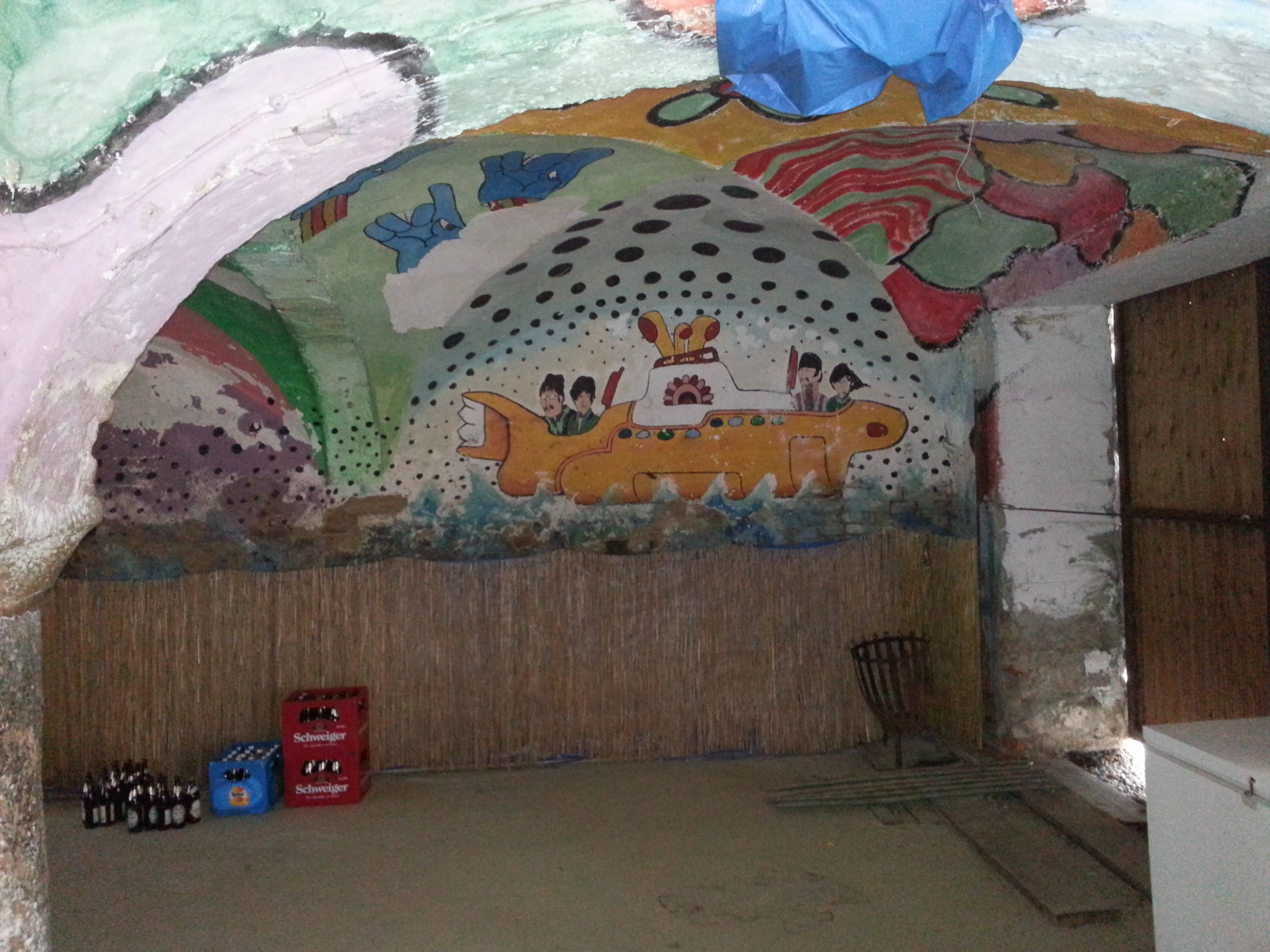 Wandmalerei aus der Serie Irgendwie und Sowieso im Jahr 2012